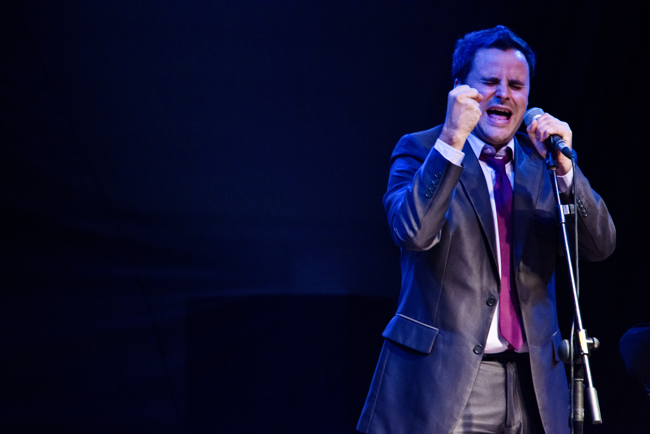 El cantaor flamenco Juan Pinilla en plena actuación